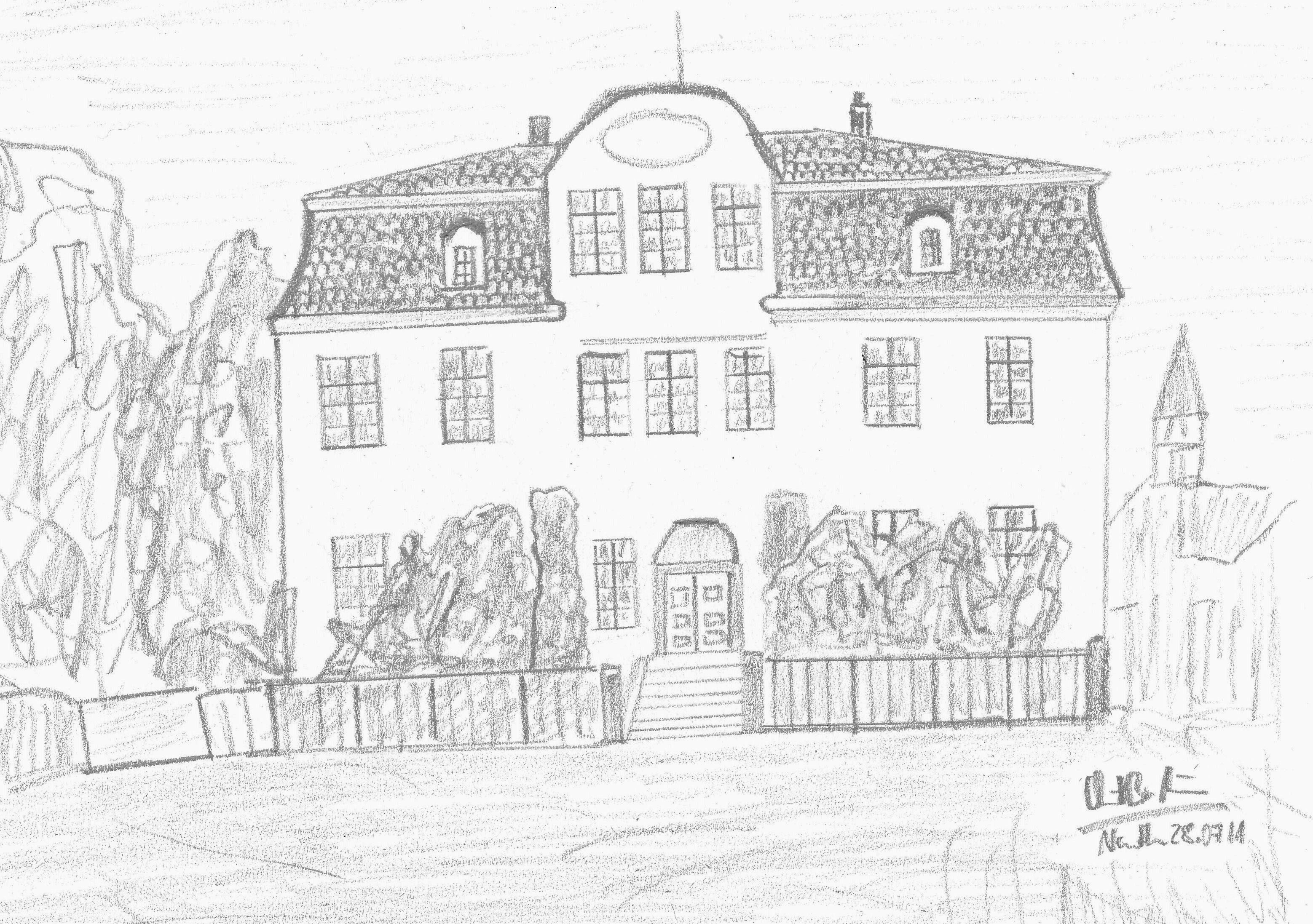 Zeichnung des Amthauses in Lindau (Eichsfeld), welches 1974 abgerissen wurde. Vorlage für die Zeichnung war eine alte Postkarte.